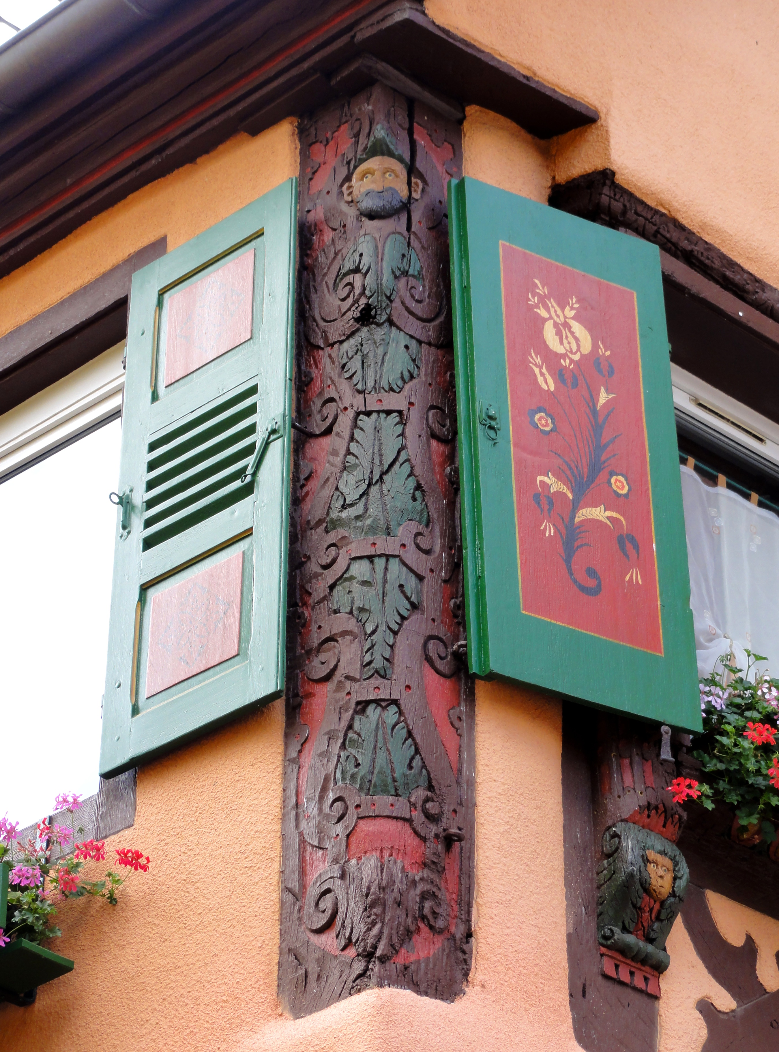 Alsace, Haut-Rhin, Ingersheim, Maison (XVIe-XVIIe), 5 rue des Poilus: porteau-cornier et peinture polychrome alsacienne sur volet. .